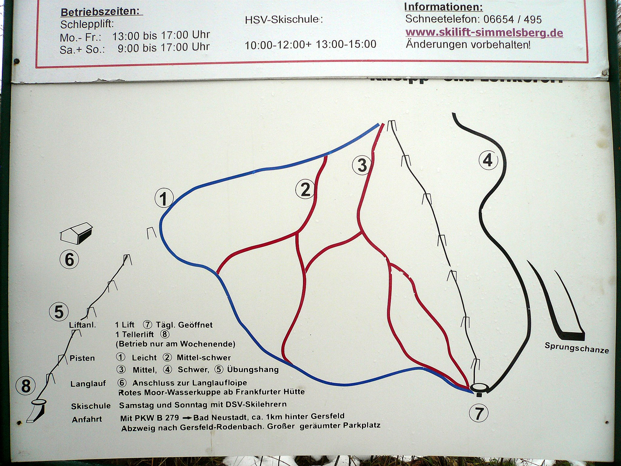 Skizentrum Simmelsberg